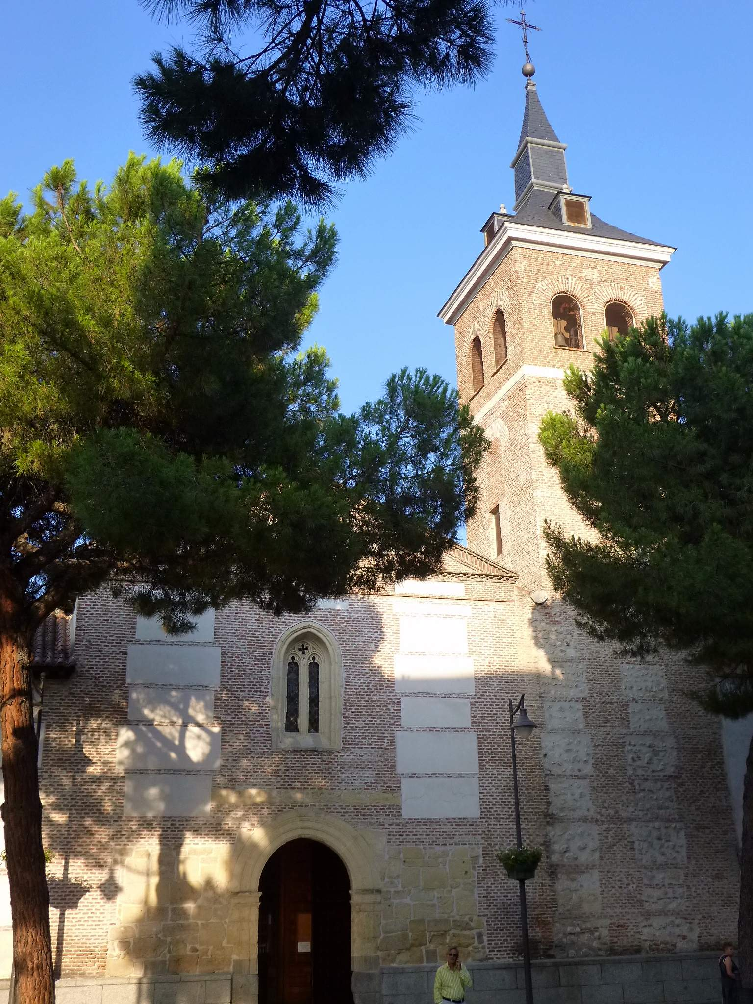 Iglesia de San Pedro Mártir (Alcobendas)